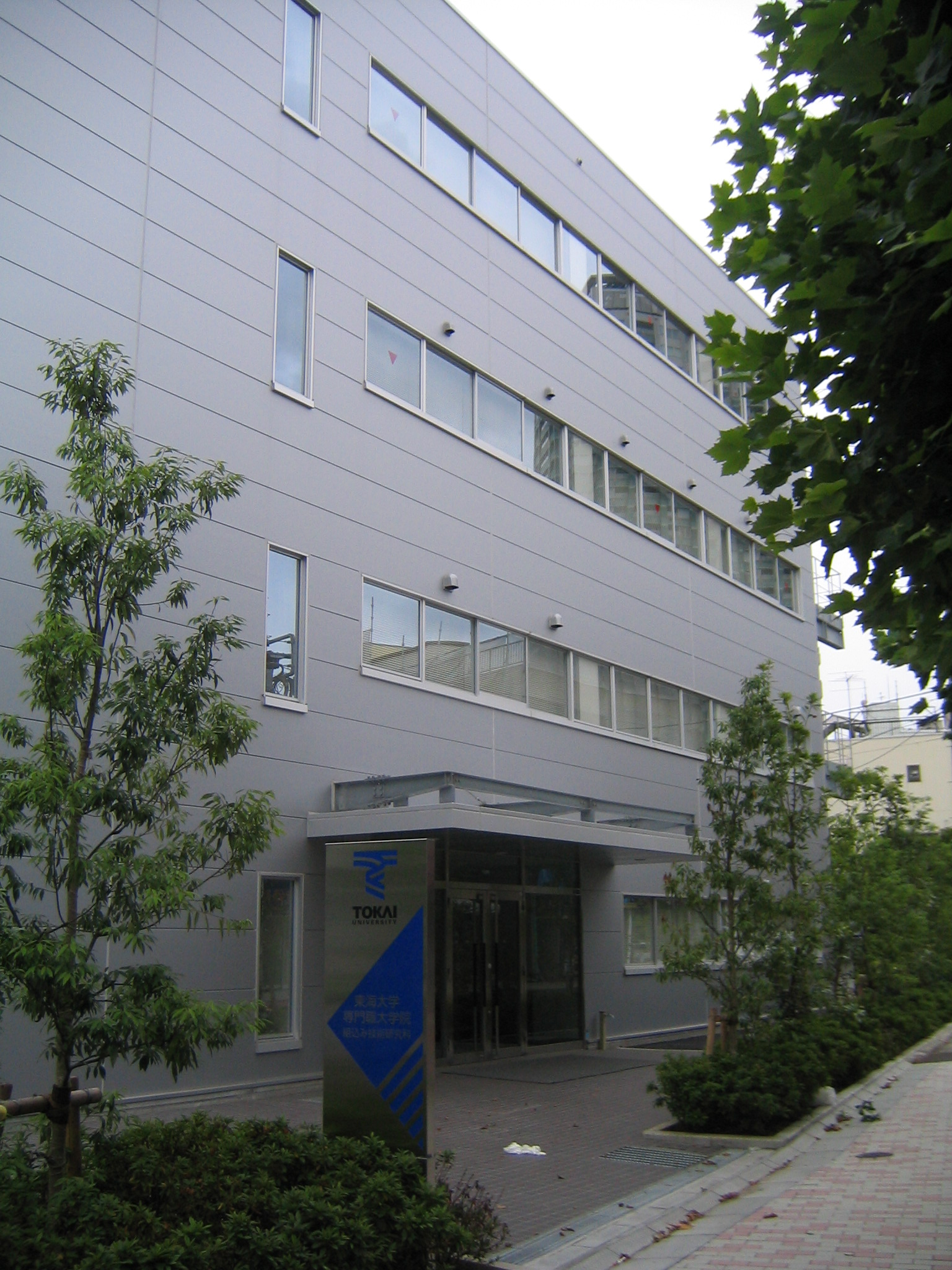 東海大学高輪キャンパス